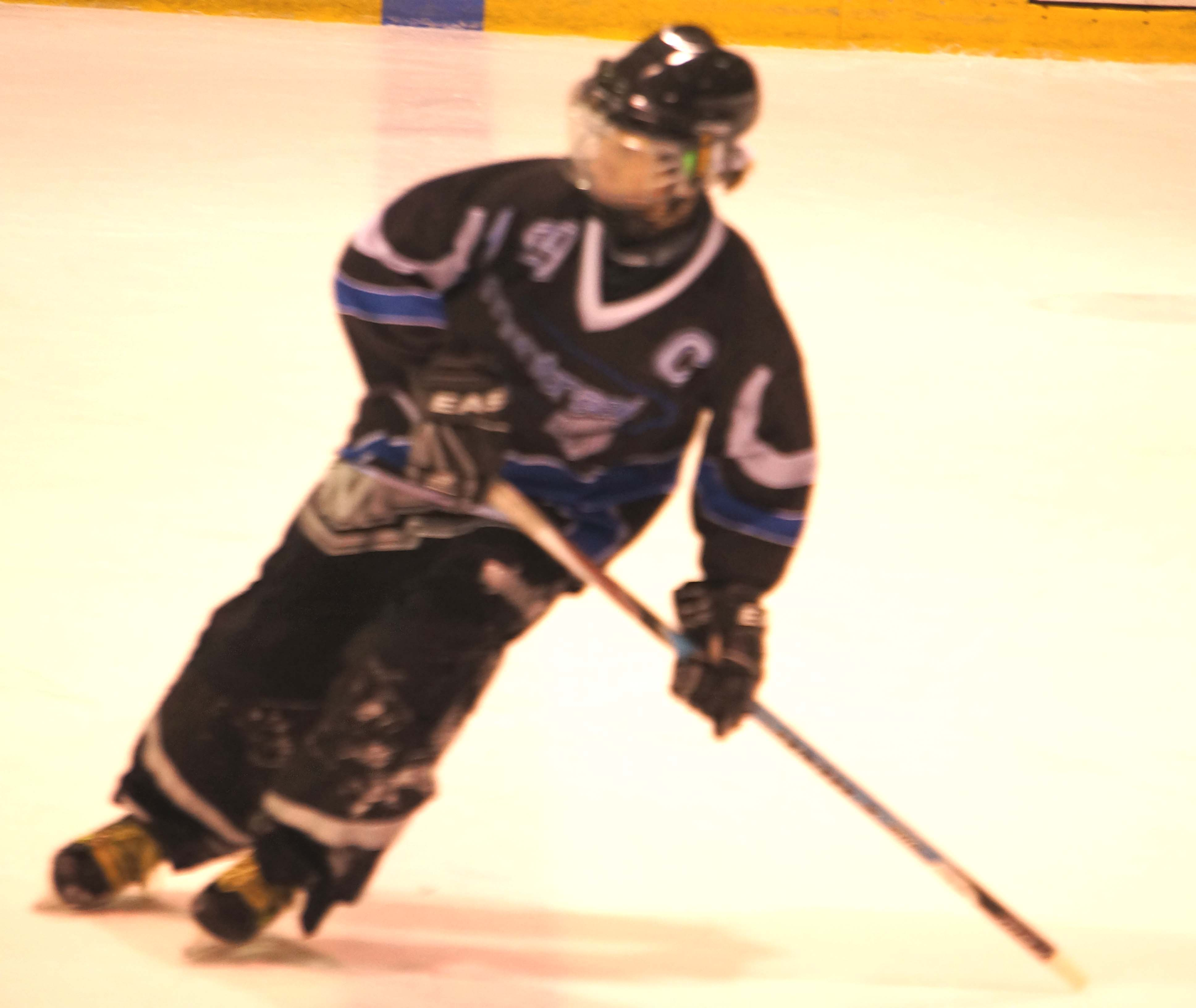 Ringuette